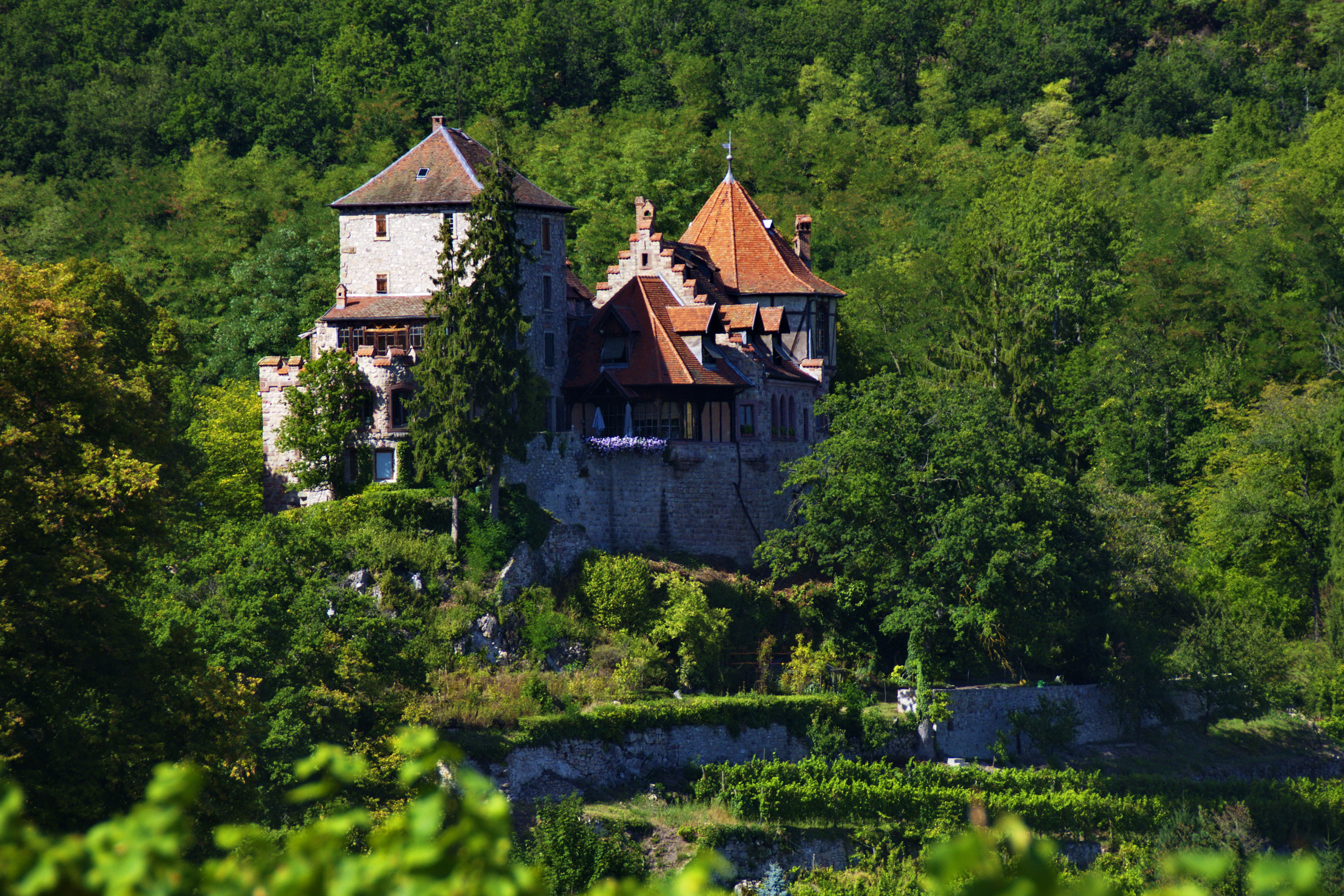 Château de Reichenberg, Beim Schloss4 route de Thannenkirch (Inscrit, 1995) .